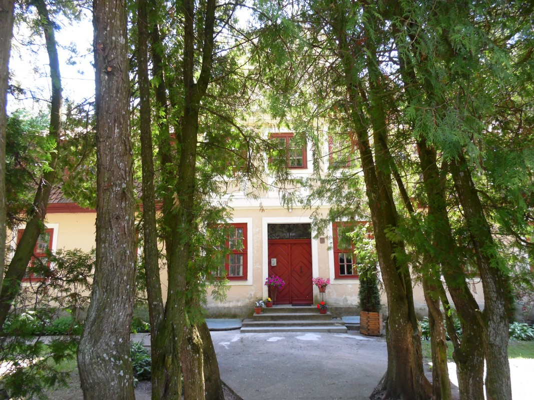 PLEBANIA.